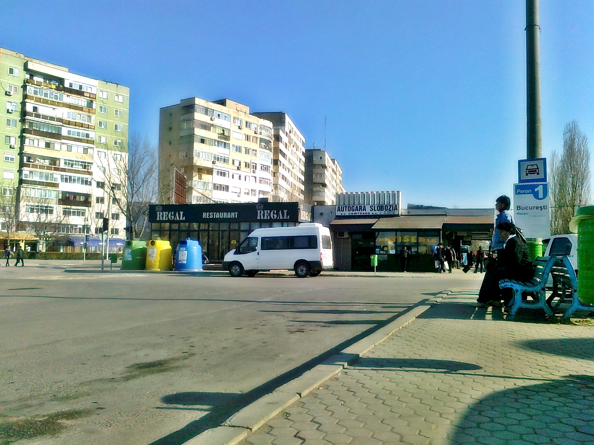 Autogara Slobozia